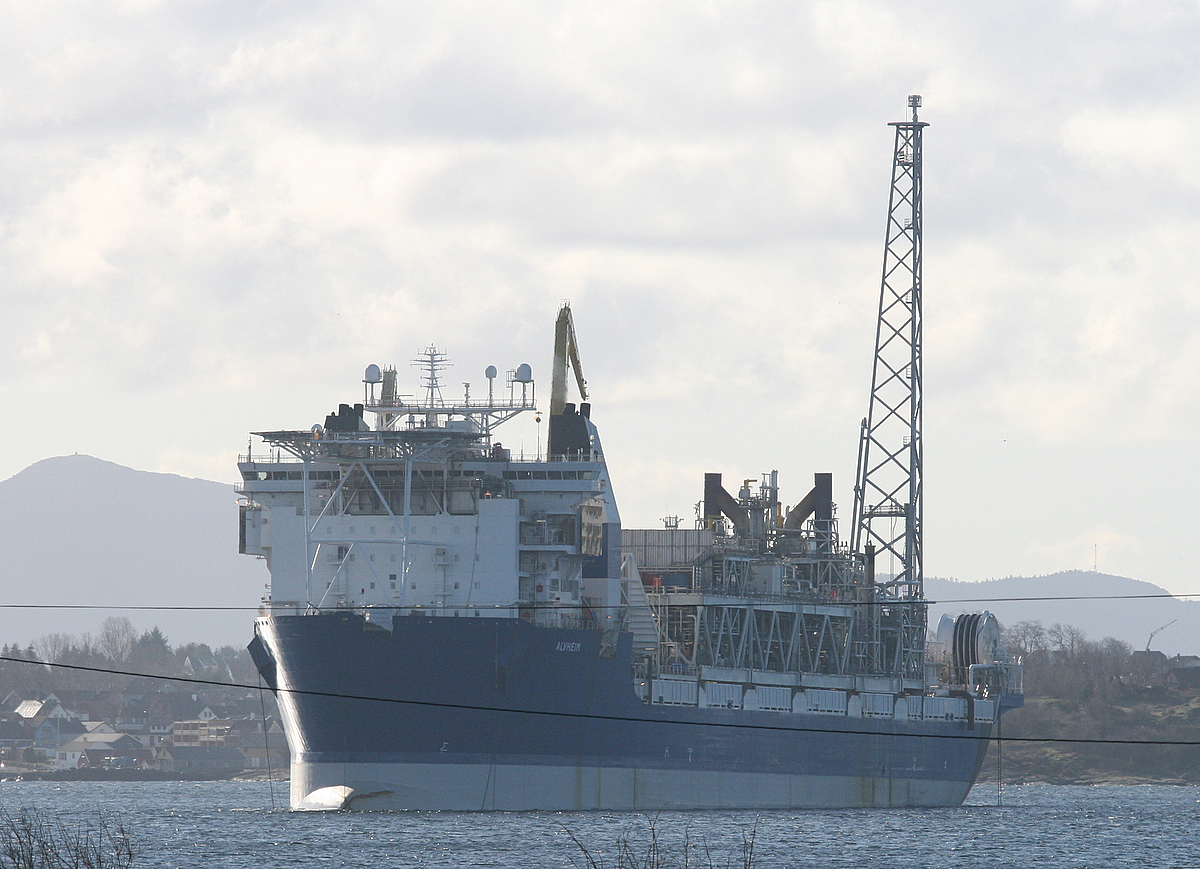 Alvheim IMO Number: 9170078 MMSI Number: 257161000 Callsign: LNEJ Length: 252 m Beam: 42 m